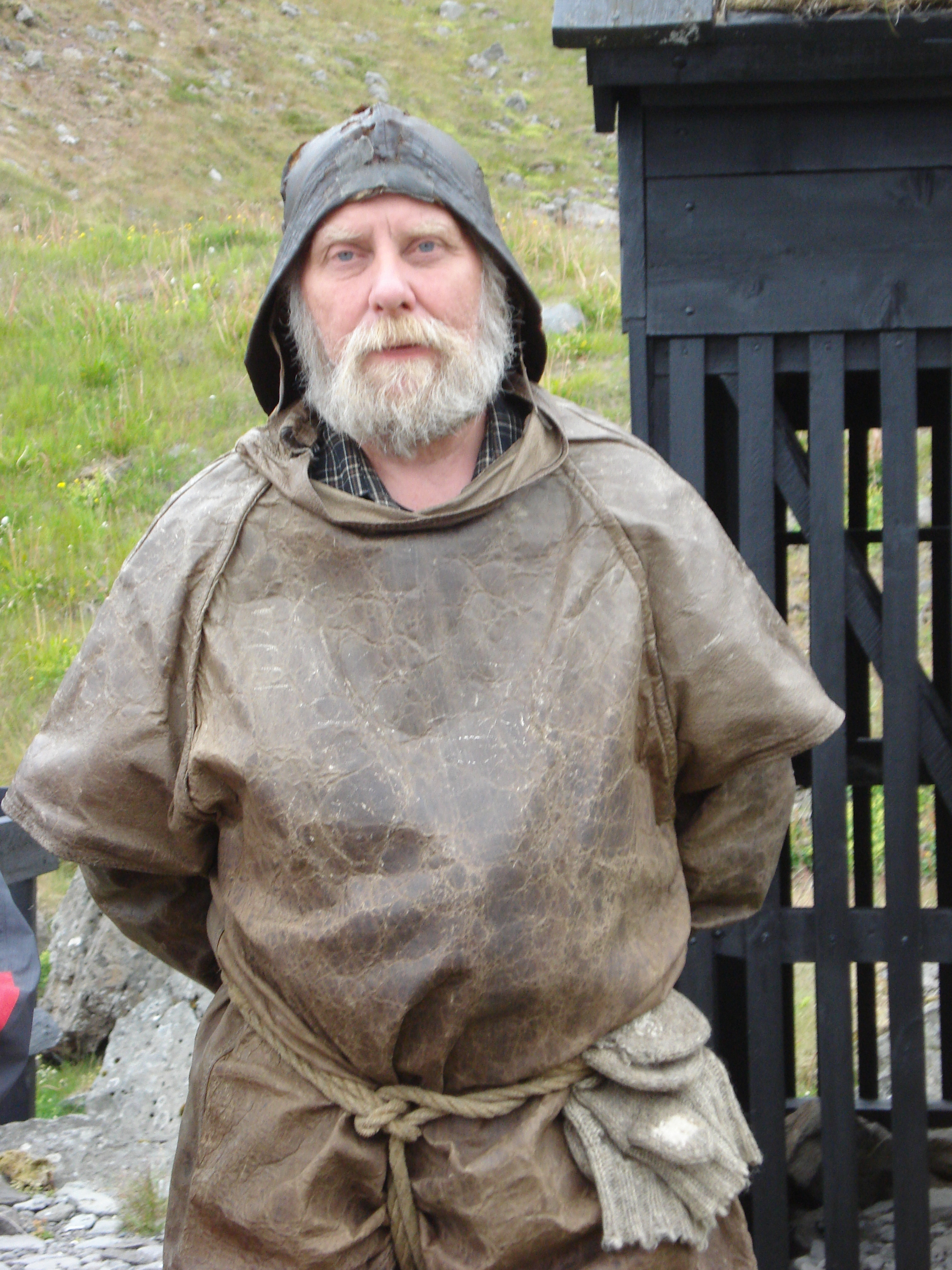 Traditional Fisherman, Bolungavík, Iceland